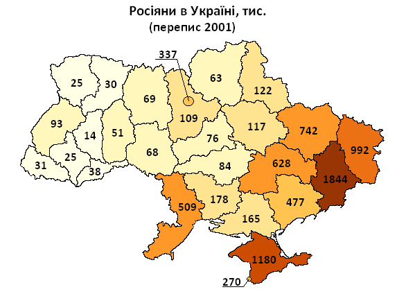 Чисельність росіян в Україні за регіонами за переписом 2001 року / Number of ethnic russians in Ukraine by regions according to 2001 census